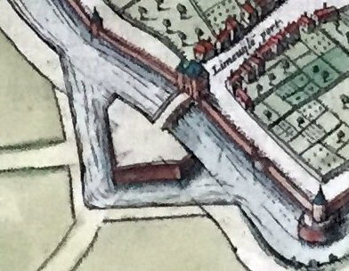 Detail van plattegrond van Maastricht ("MAESTRICHT / TRAIECTVM AD MOSAM"), omstreeks 1575 getekend. Handgekleurde kopergravure in het Stedenboek van Braun & Hogenberg, uitgegeven in 1588 te Keulen als deel 3 van: Civitates orbis Terrarum: Urbium praecipuarum totius mundi Liber tertius (...). Afmetingen: 35,5 x 41 cm. Het hier weergegeven detail toont de Tongersepoort en omgeving.